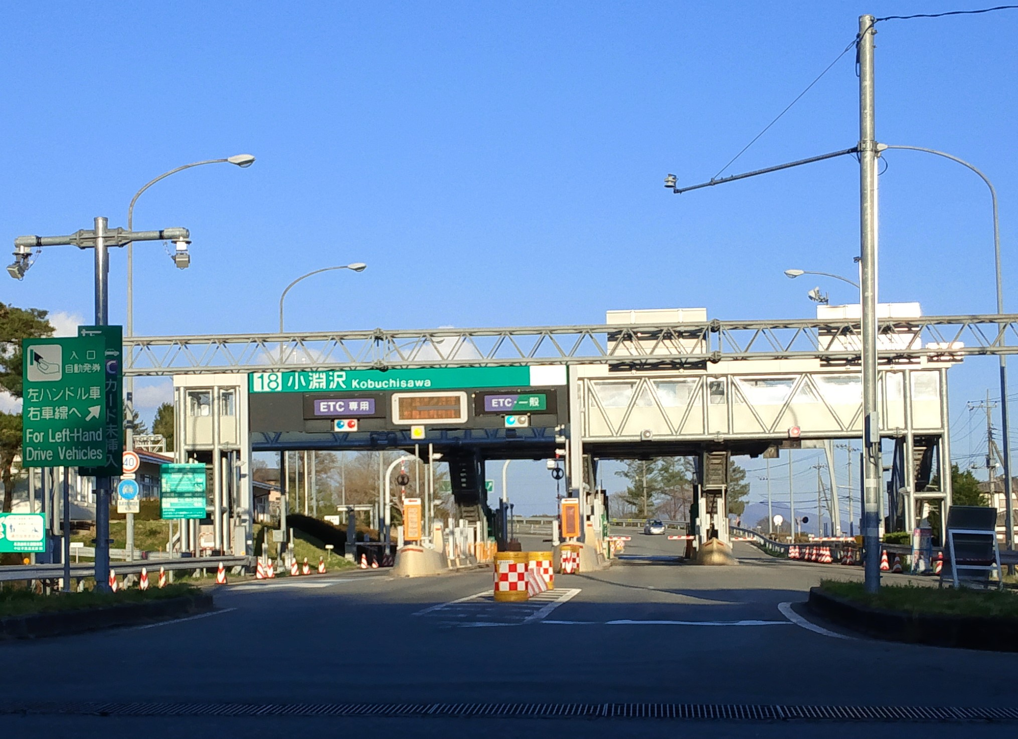 中央自動車道小淵沢インターチェンジ料金所